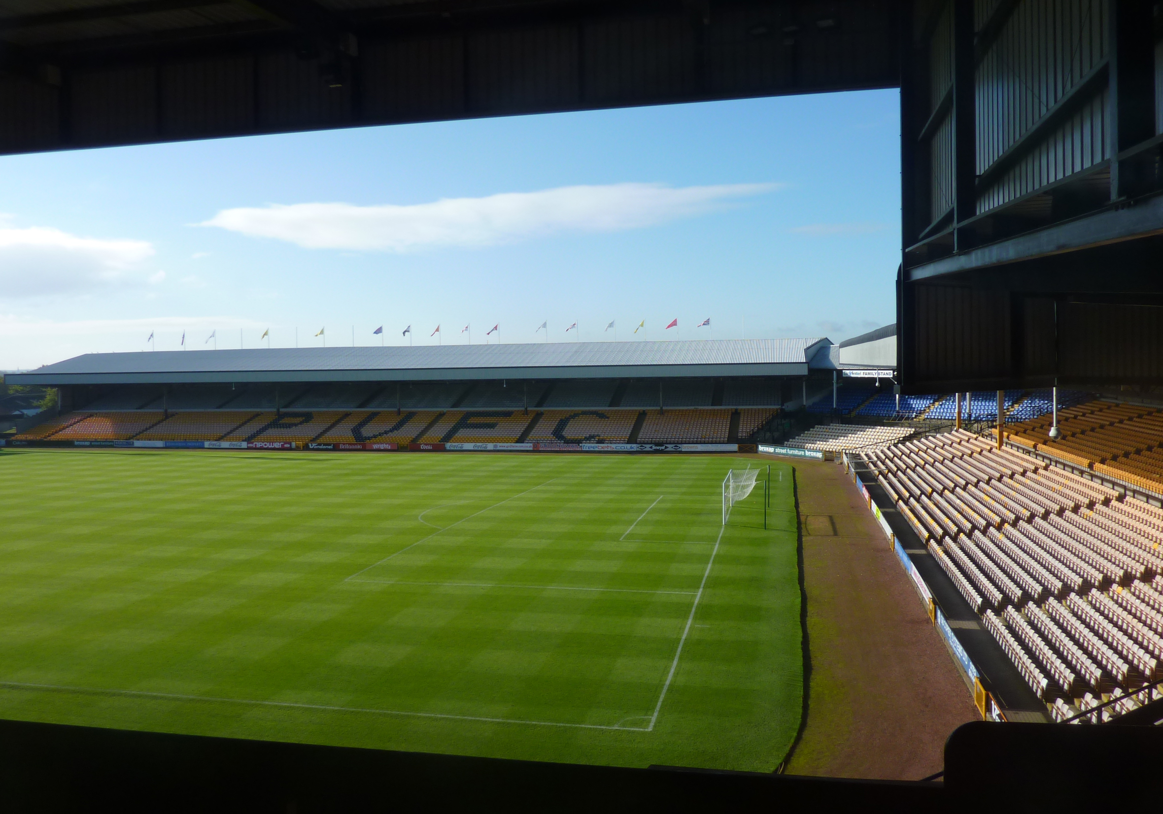 NDCS Volunteering